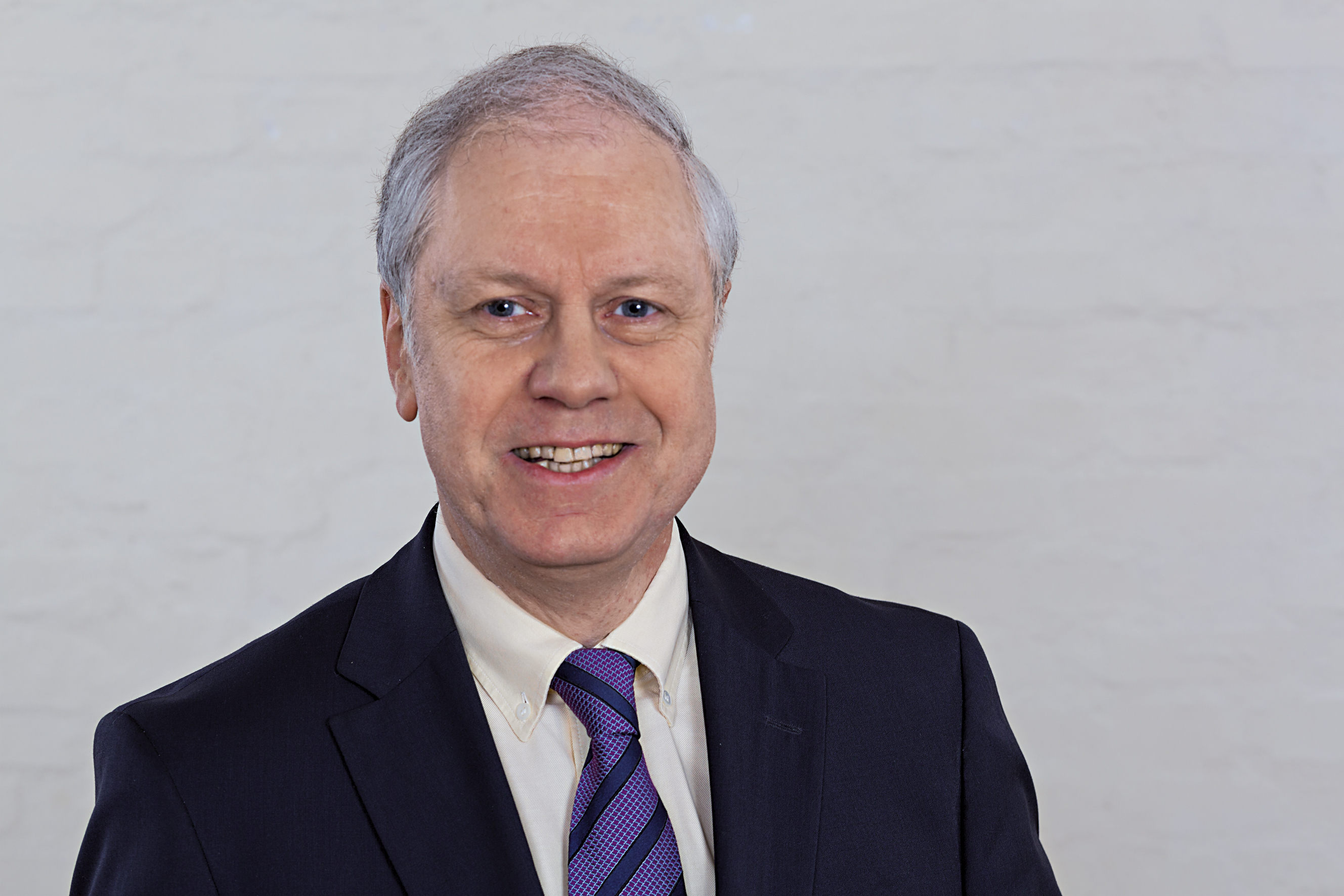 Prof. Dr. med. Dipl.Psych. Andreas Ferbert im Porträt